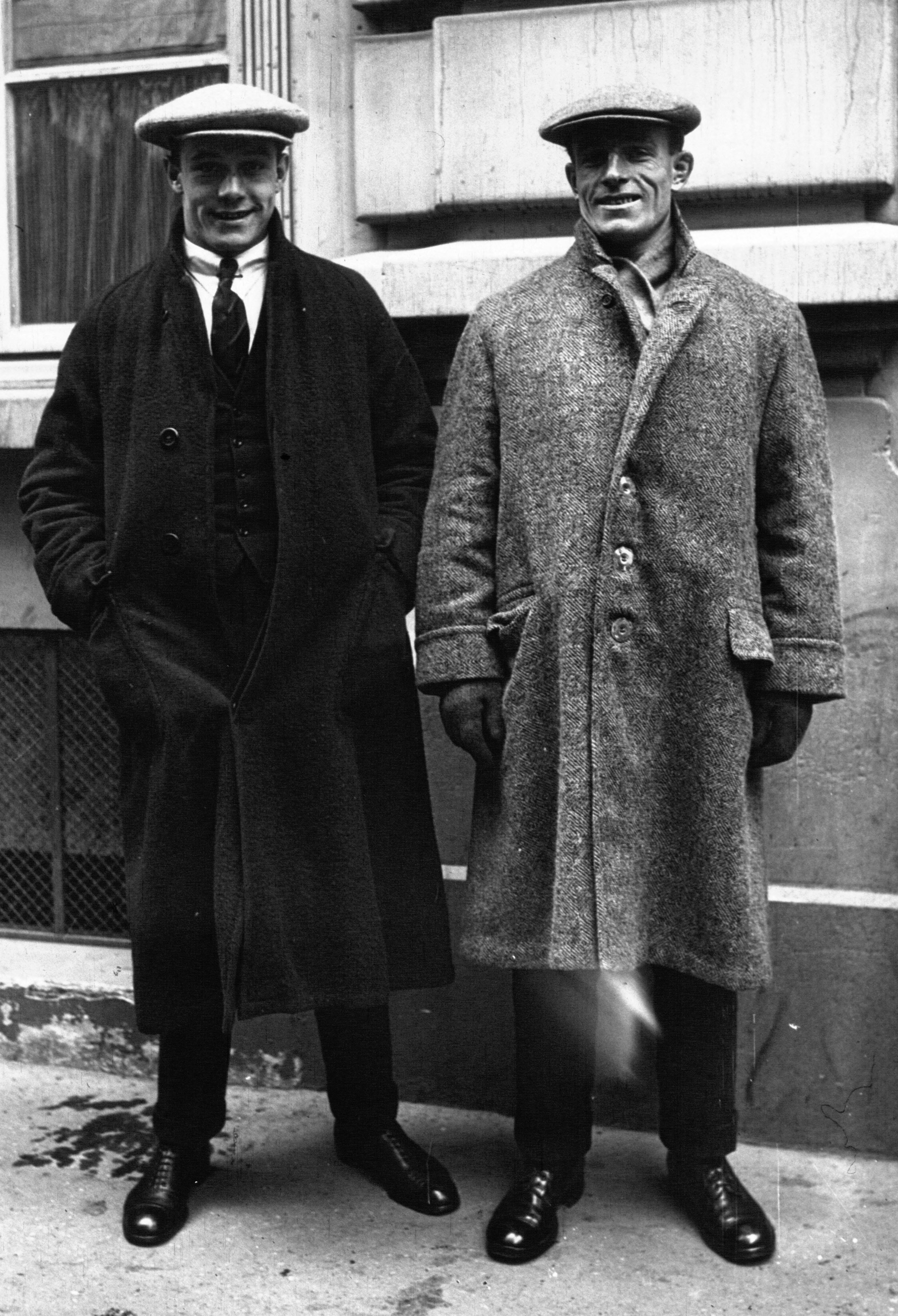 Match de rugby France-Galles, à droite Steve Morris, à gauche le capitaine Parker.